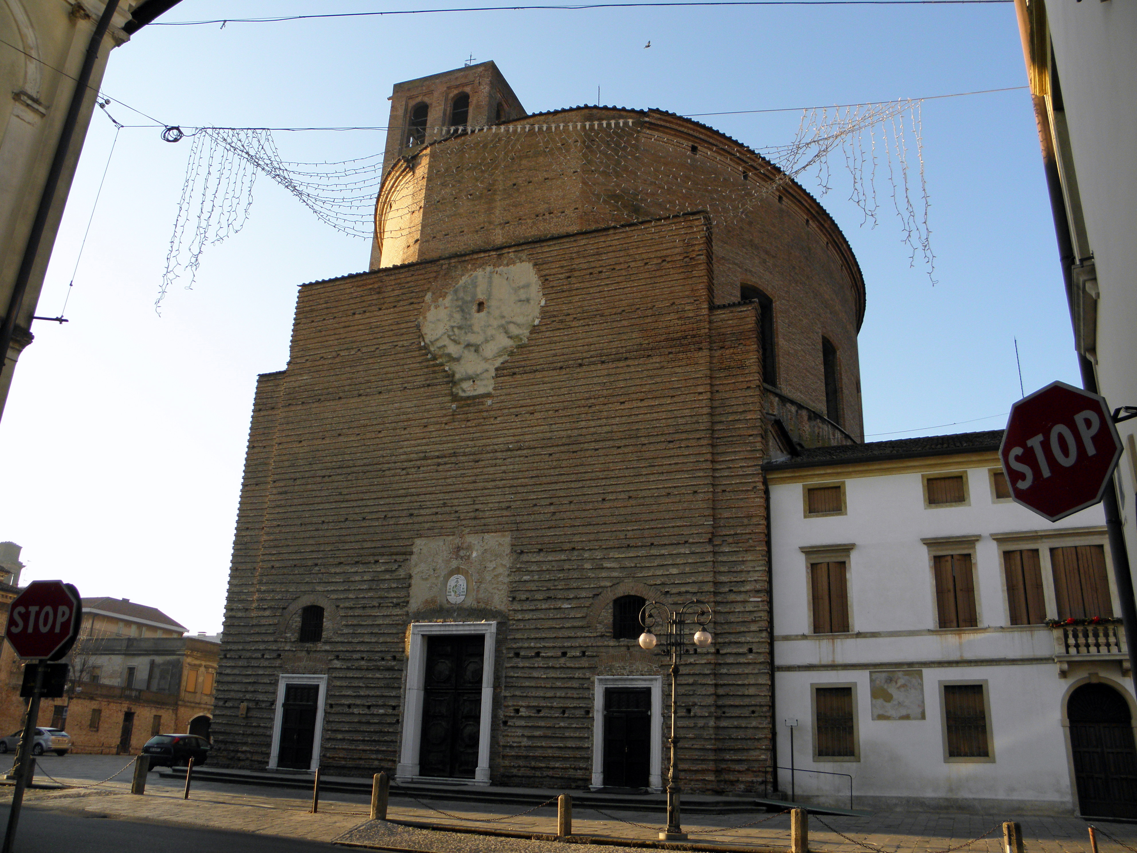 Este, Duomo di Santa Tecla: vista della facciata.